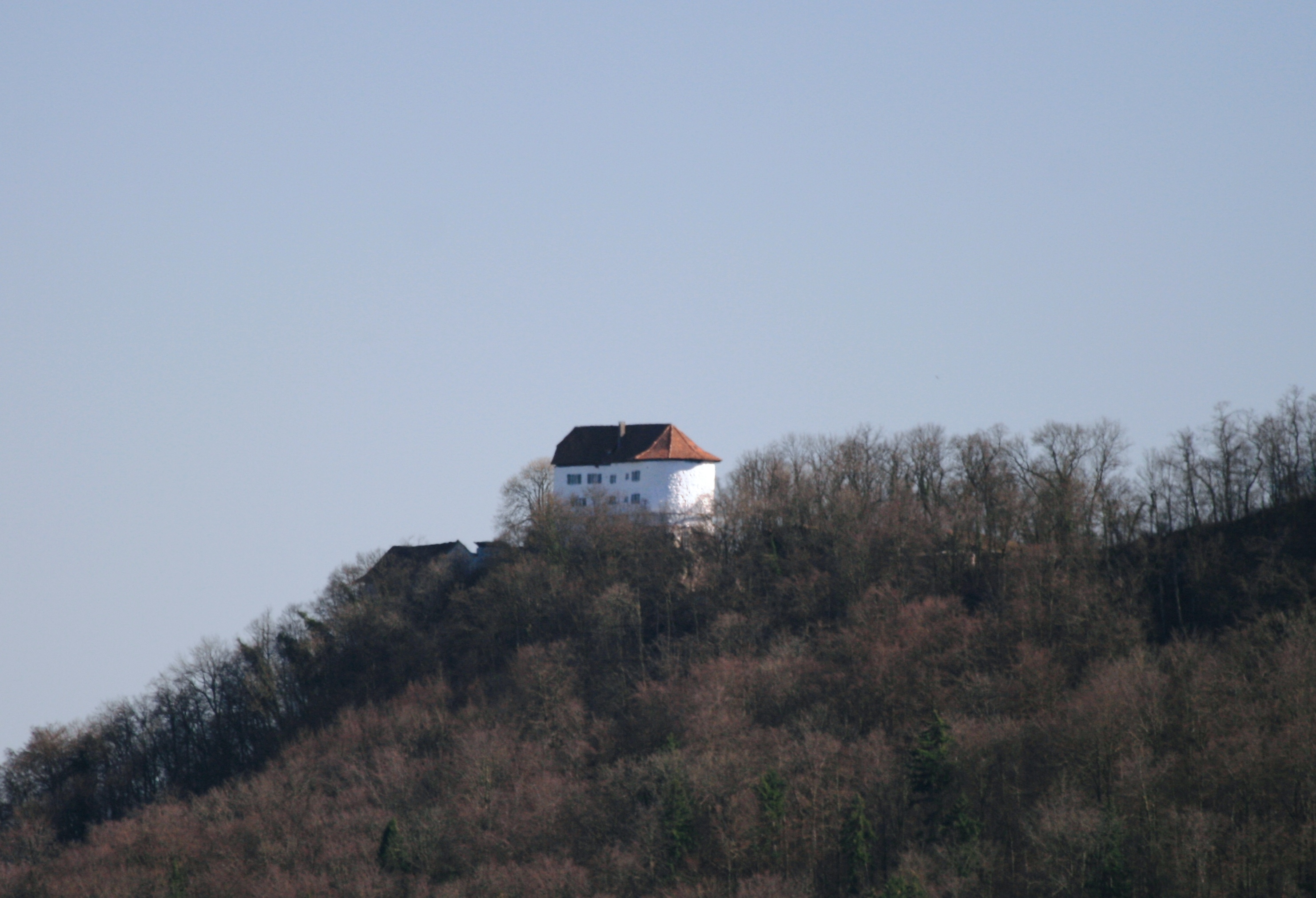 Schloss Brunegg (Blick von Lupfig), Aargau, Schweiz